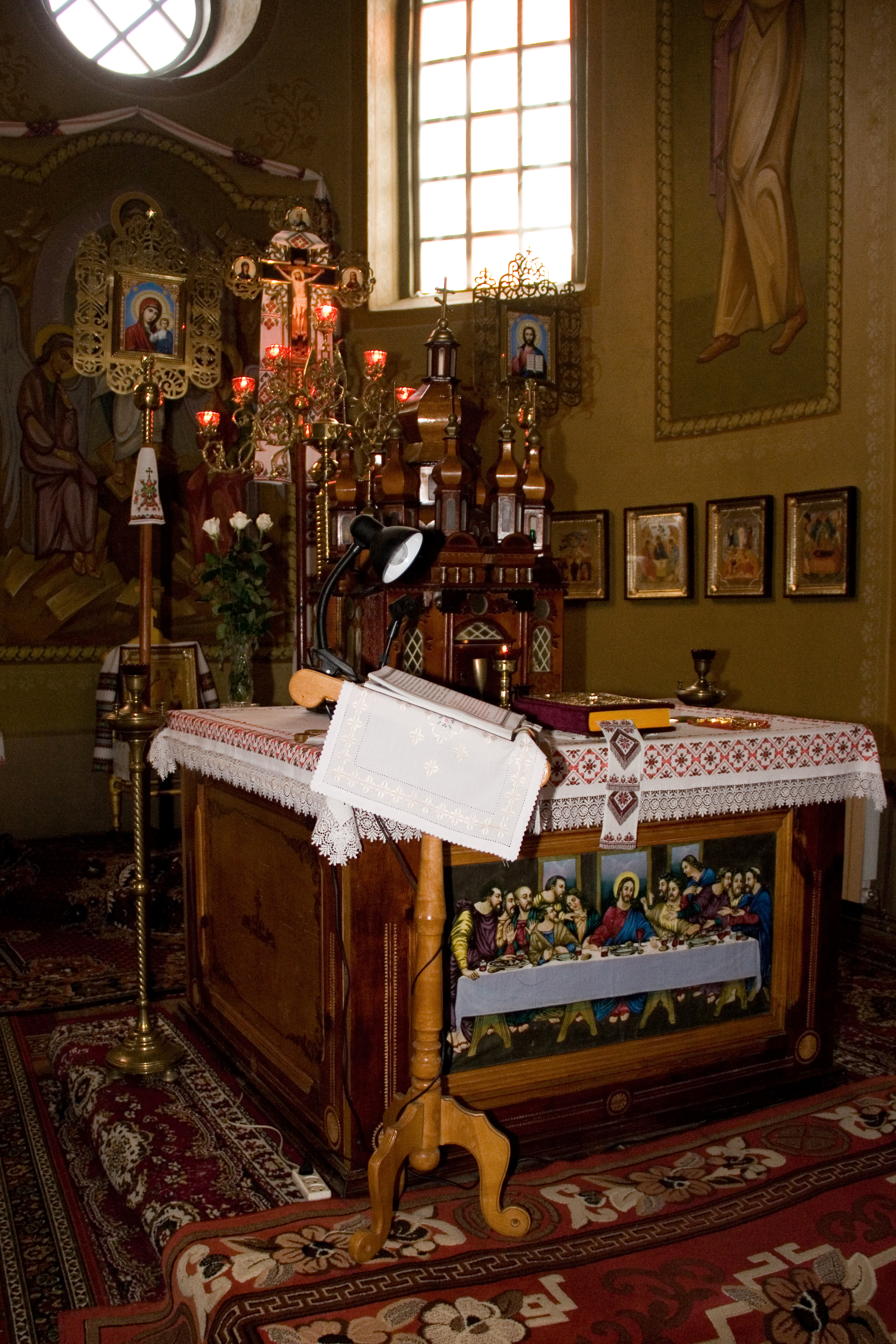 Престіл